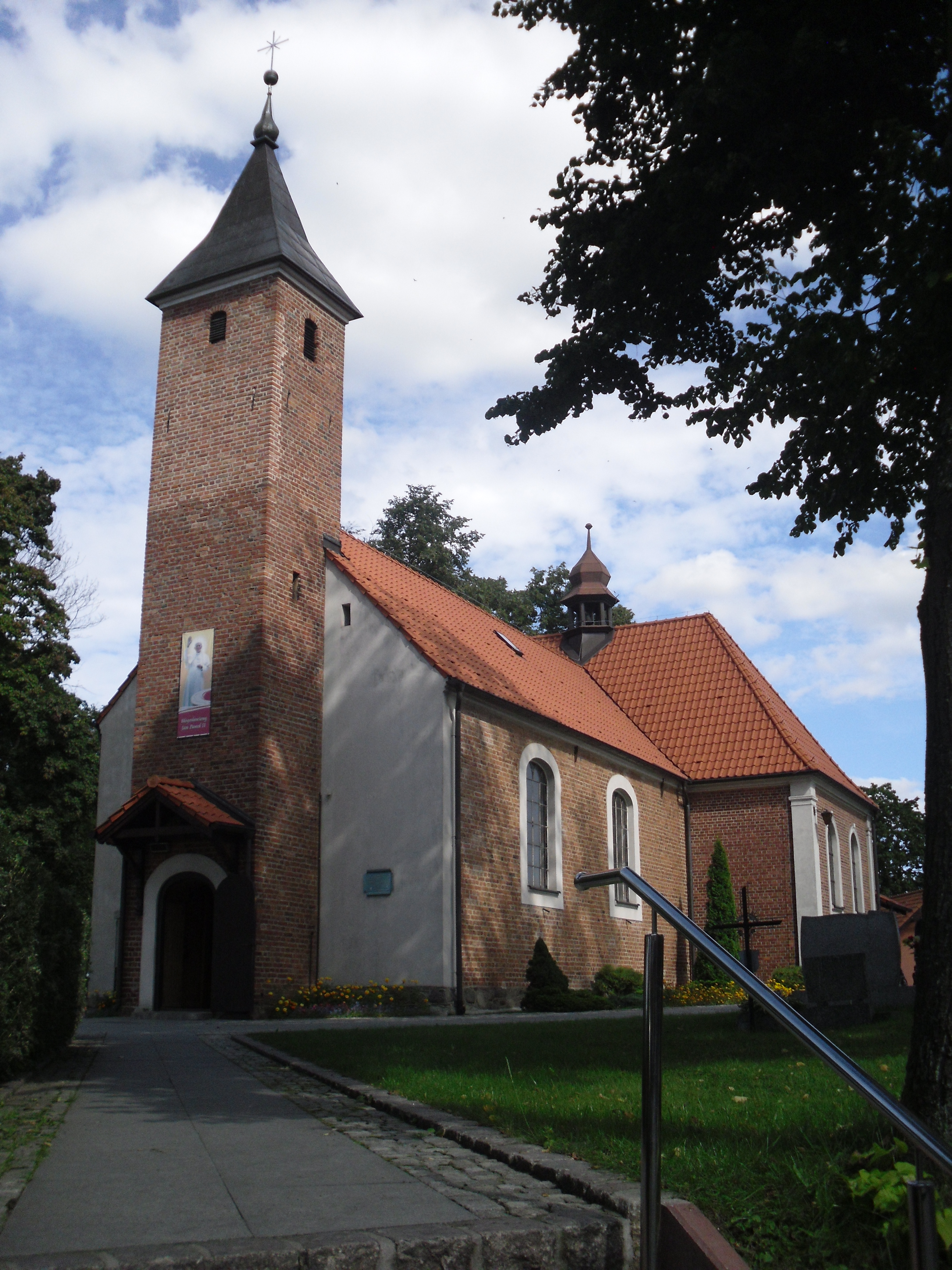 kościół parafialny p.w.Św. Michała Archanioła Kiełpino, Kiełpino